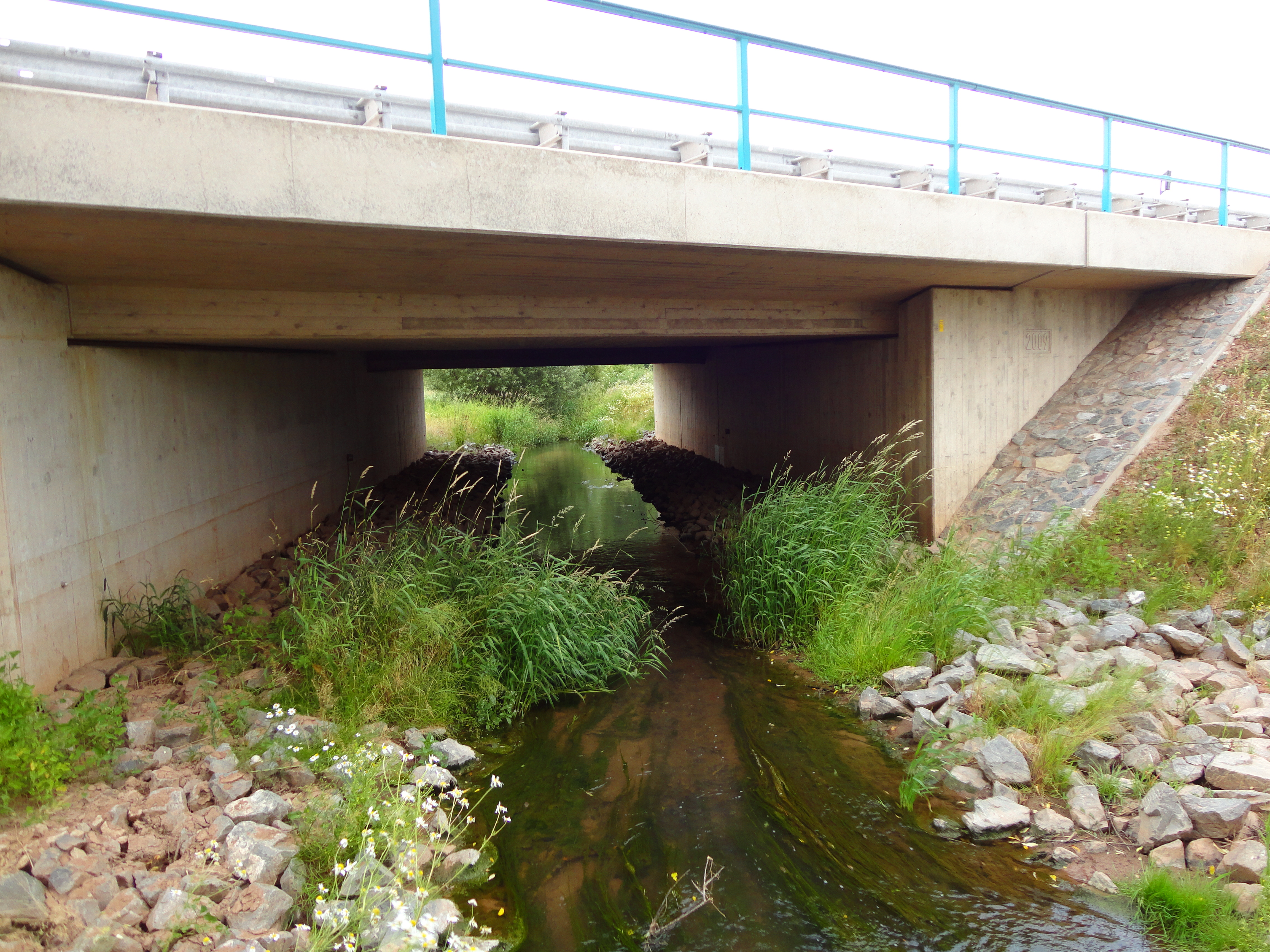 Röstegraben unter B243n